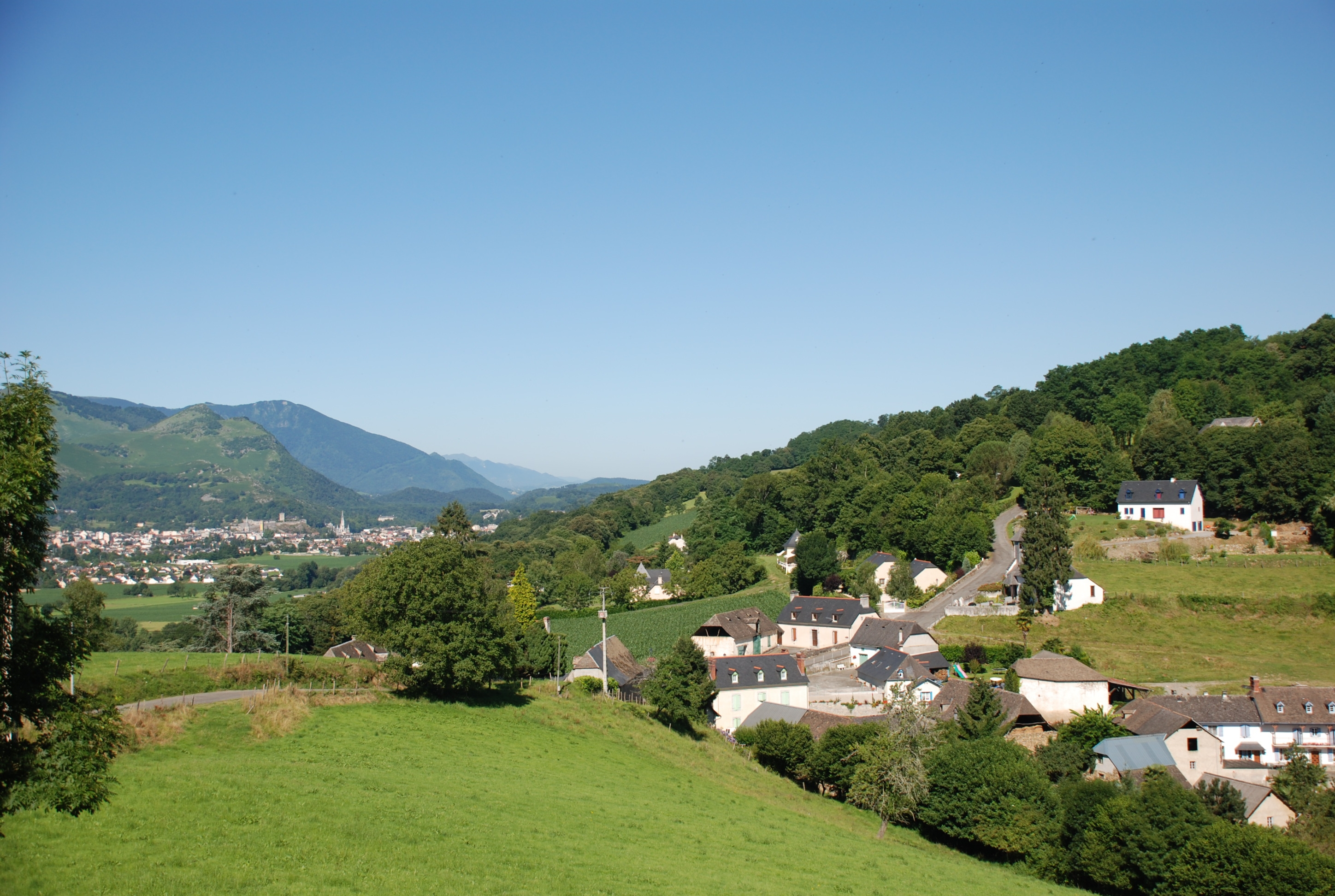 Vue du village de Bourréac depuis la hauteur de Puyolle en allant vers le hameau de Recahorts. La ville de Lourdes est dans le fond, avec l'église paroissiale du Sacré-Coeur, le château fort et la basilique du Rosaire et de l'Immaculée Conception (sanctuaire de la Grotte).